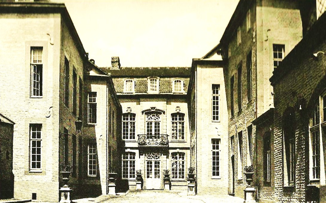 Patrizierhaus Fey auf dem Seilgraben in Aachen, Postkartenausschnitt